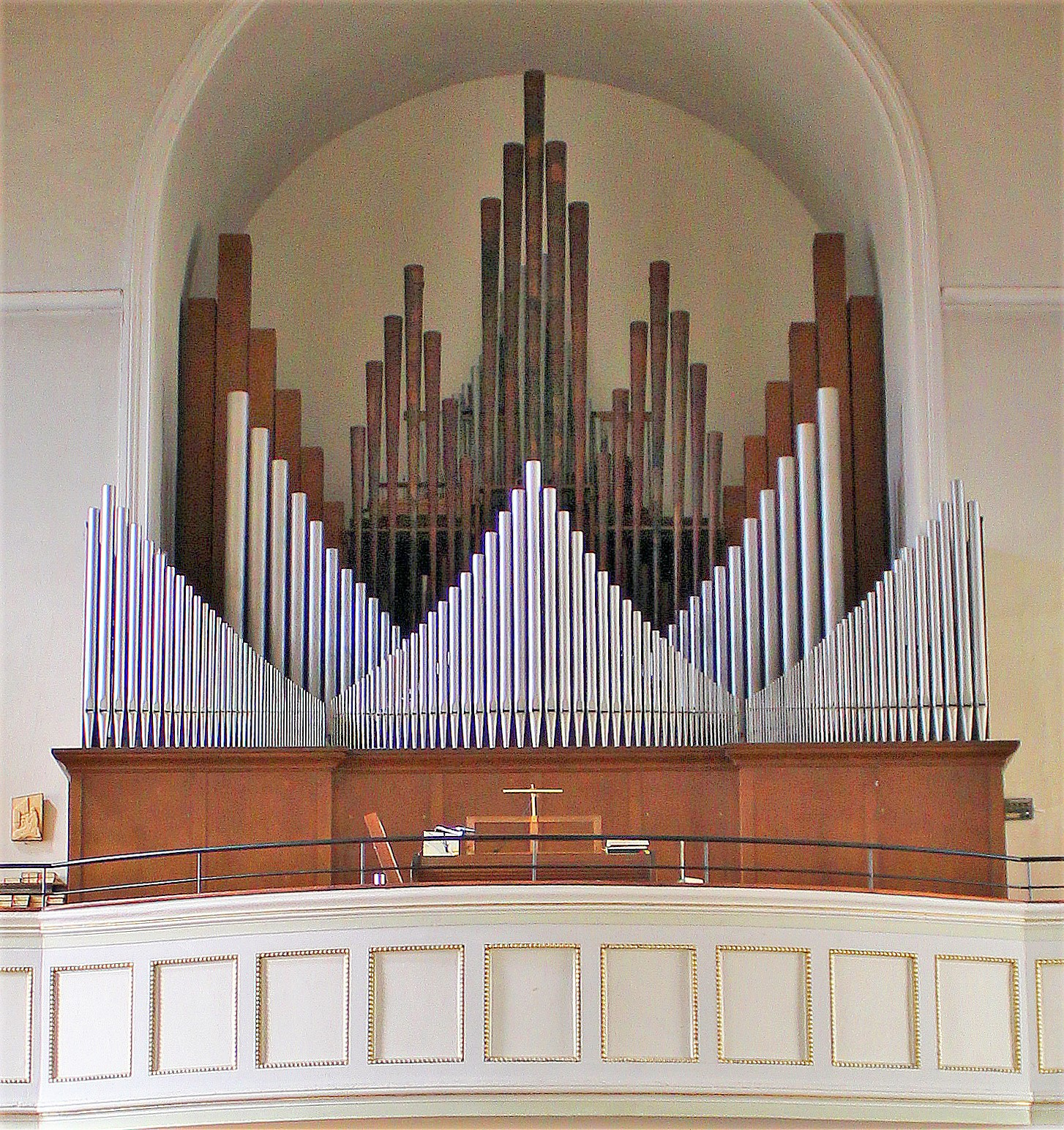 Blick ins Innere der katholischen Pfarrkirche St. Franziskus in Urexweiler, einem Ortsteil der Gemeinde Marpingen, Landkreis St. Wendel, Saarland